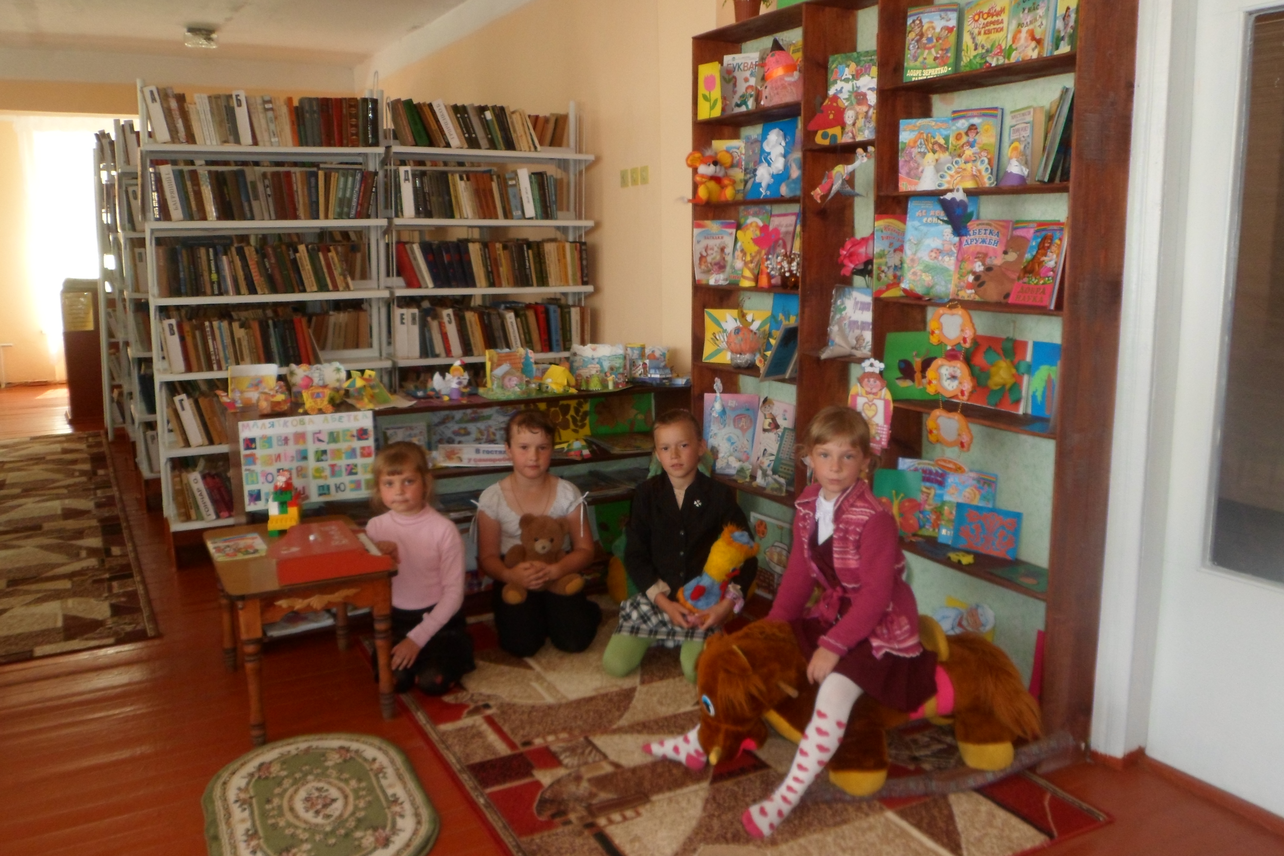 У бібліотеці